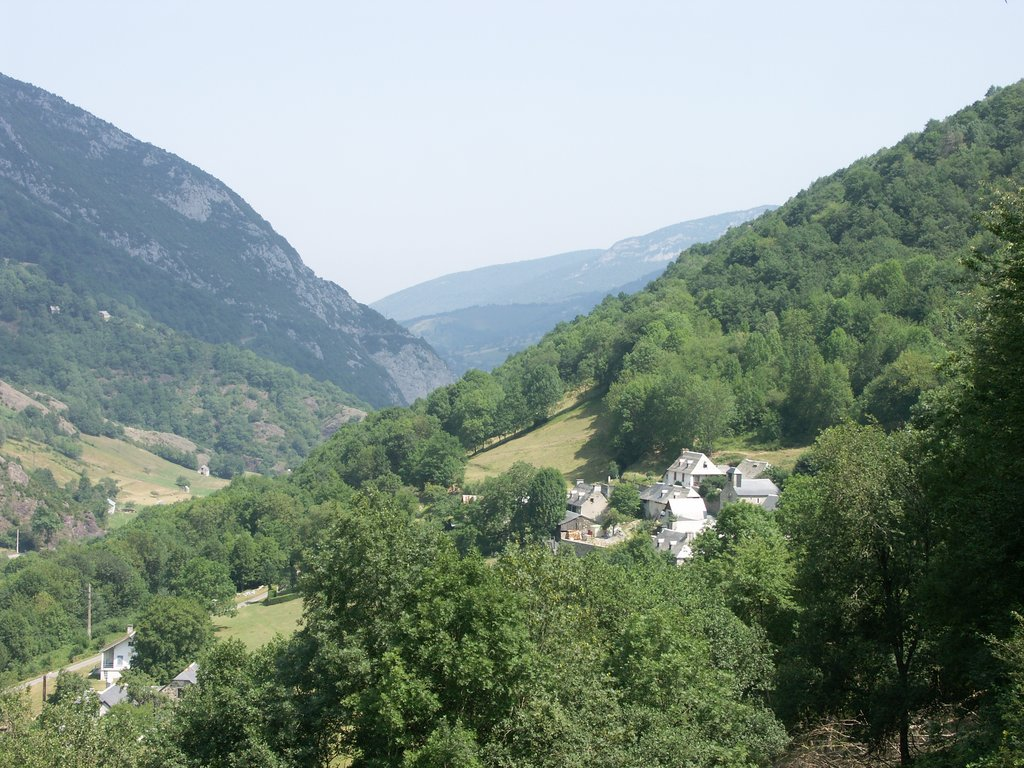 Commune de Fréchet-Aure, Hautes-Pyrénées